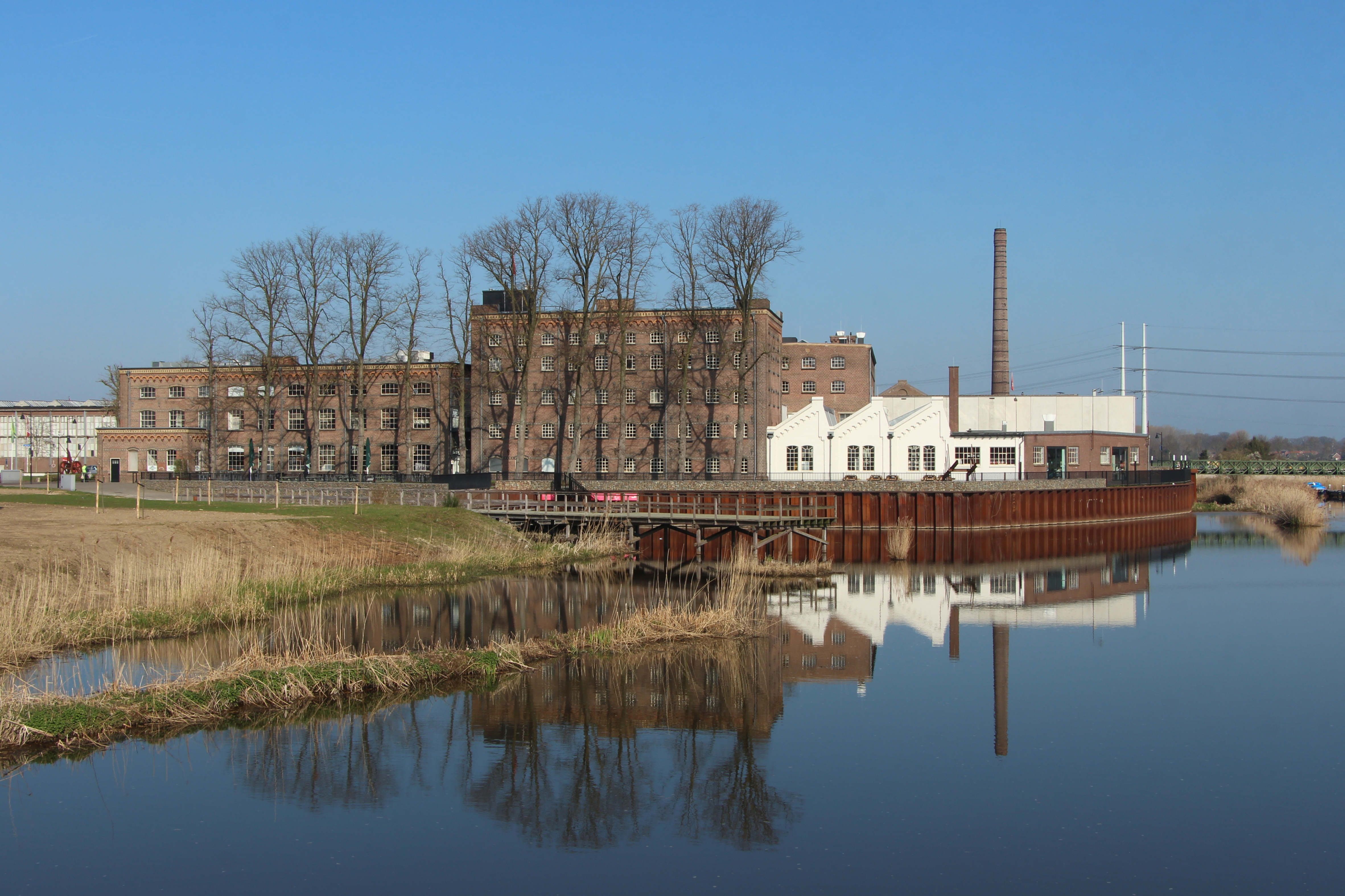 DRU complex in Ulft. Portiersgebouw met bibliotheek.